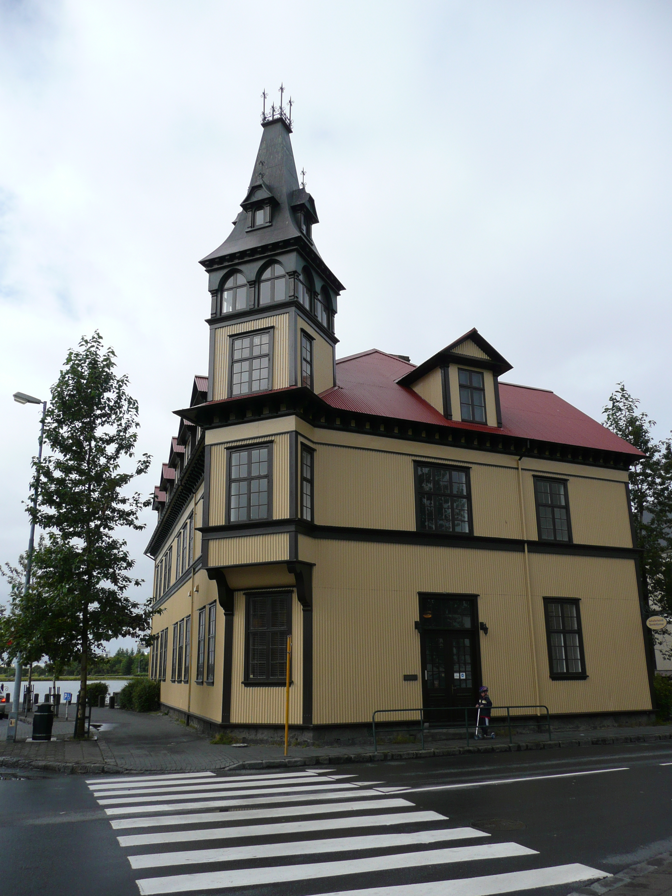 Idnarmannafelagshus